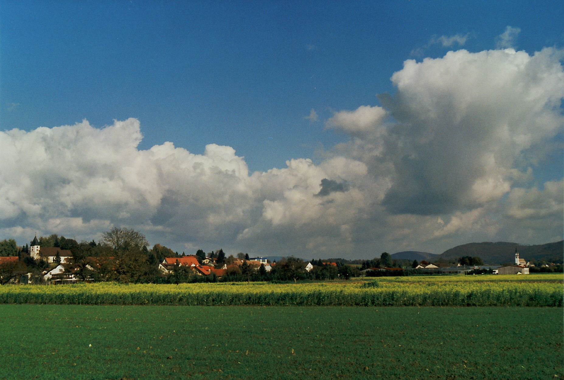 Geißlingen mit Kirche und Kirche von Grießen, Klettgau (Gemeinde), Landkreis Waldshut, Baden-Württemberg.